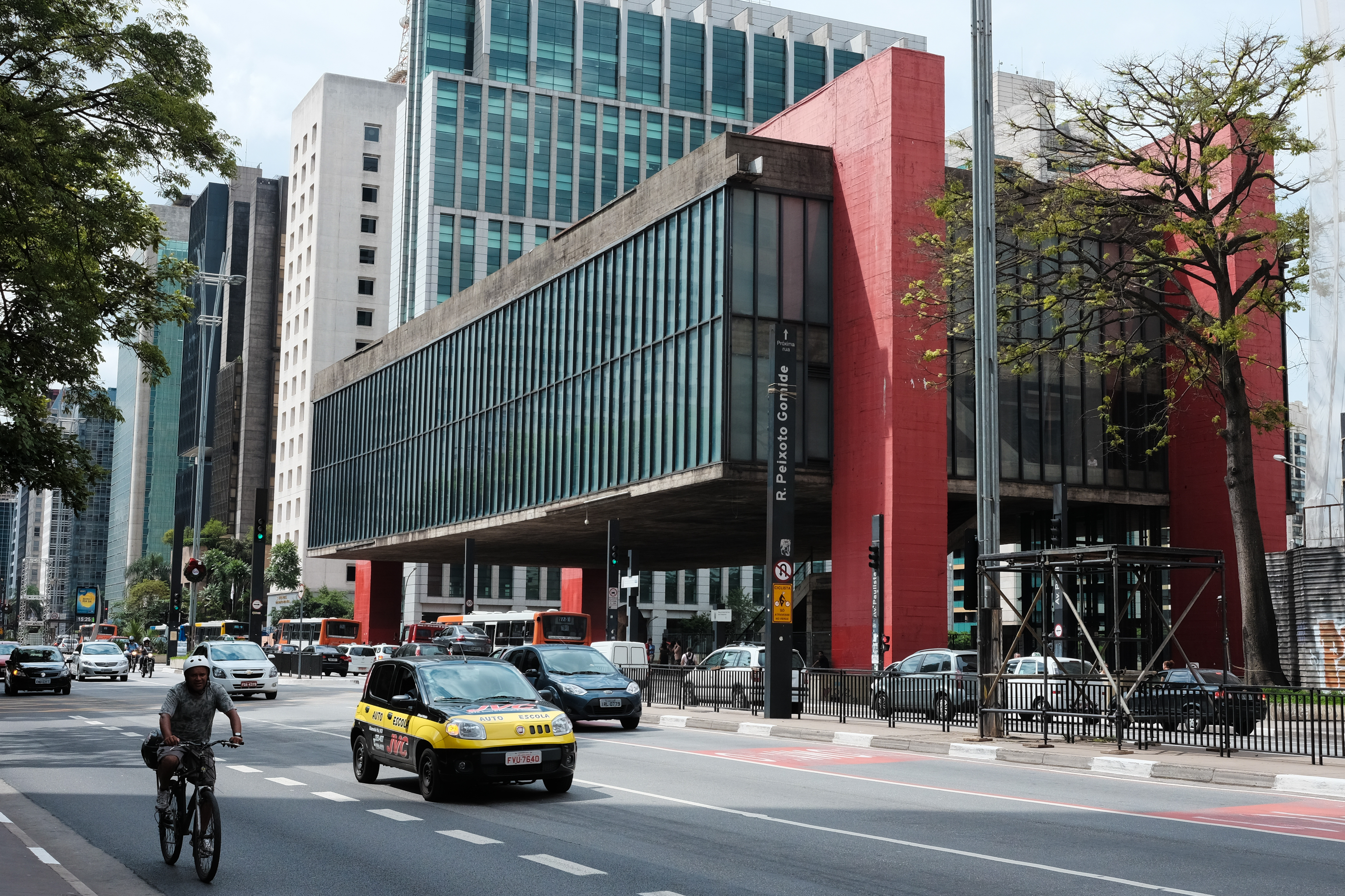 Museu de Arte de São Paulo Assis Chateaubriand - MASP: edifício e acervo móvel constituído pelos cavaletes de concreto e cristal